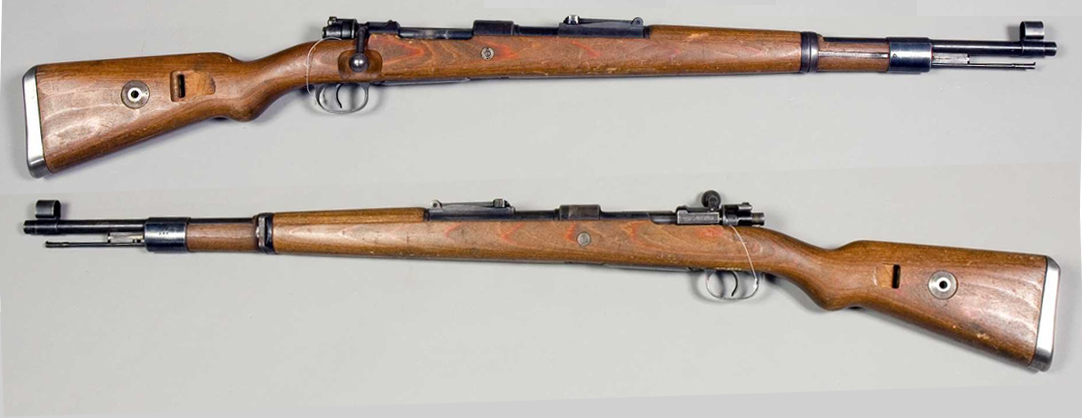 Nemška karabinka 98k, glavno orožje nemškega vojaka v drugi svetovni vojni.